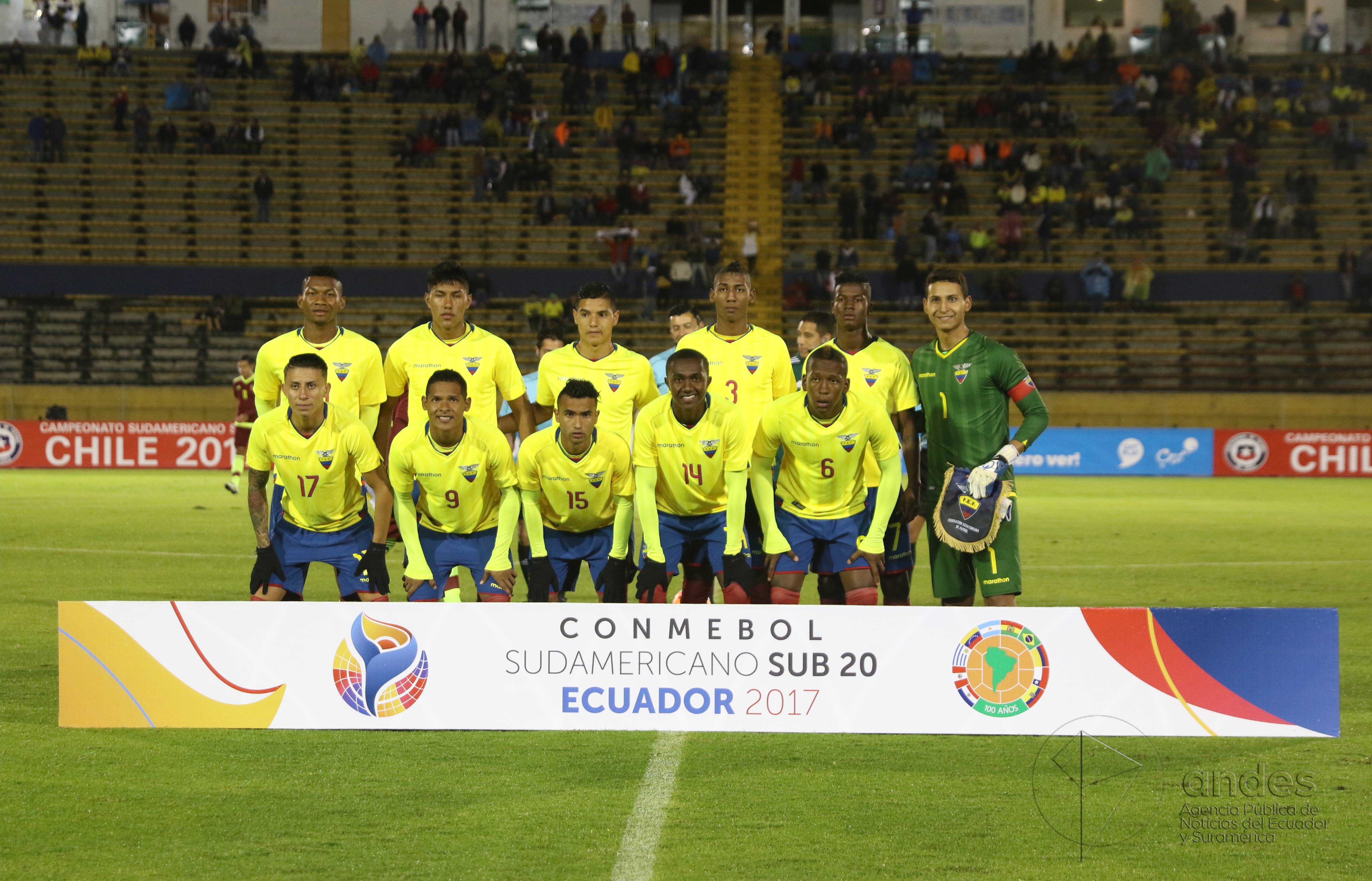 Quito, 2 feb (Andes).- La selección juvenil de Venezuela goleó 4-2 este jueves a su par de Ecuador, que comprometió seriamente sus opciones de clasificar al Campeonato Mundial Sub 20 Corea del Sur 2017, que se desarrollará en mayo próximo. ANDES/Micaela Ayala V.